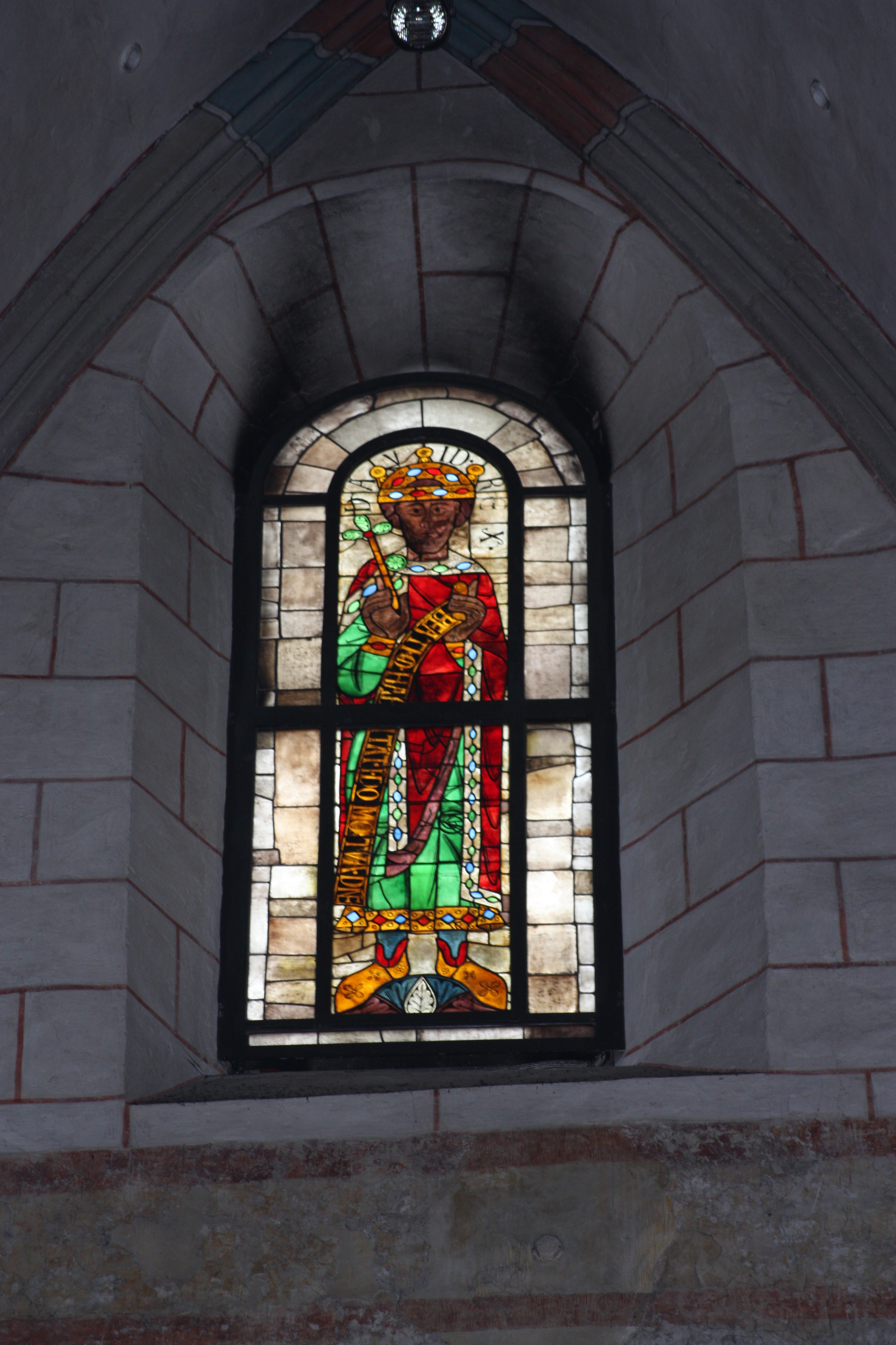 Dom Unserer Lieben Frau, Augsburg